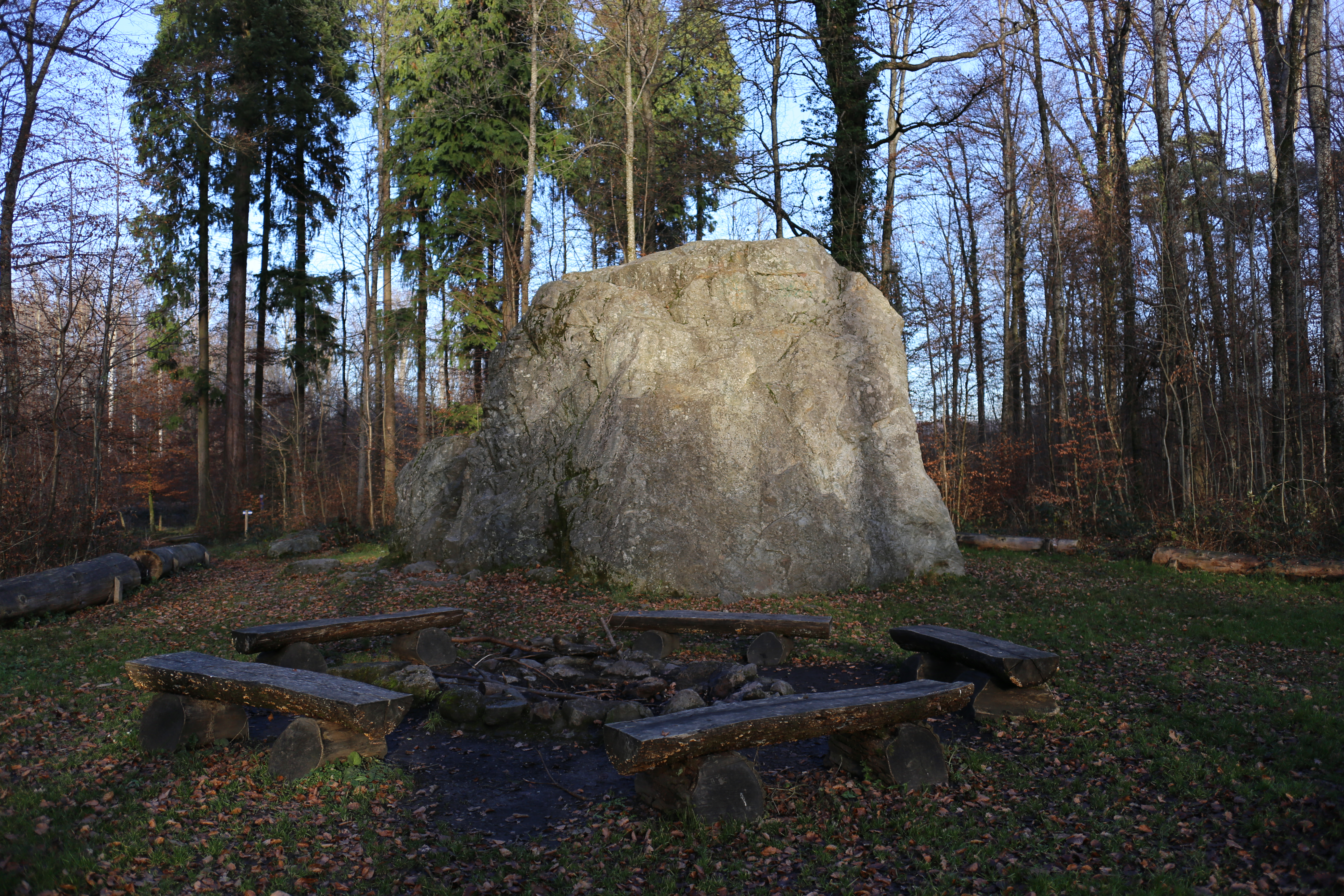 Bloc erratique Pierre à Cambot, localisé à Romanel-sur-Lausanne dans le bois Genoud.